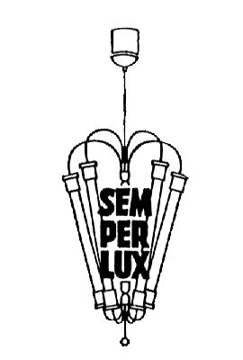 Die bekannte Kronen-Leuchte (Modell K-646) als Teil des Firmenlogos ab 1952